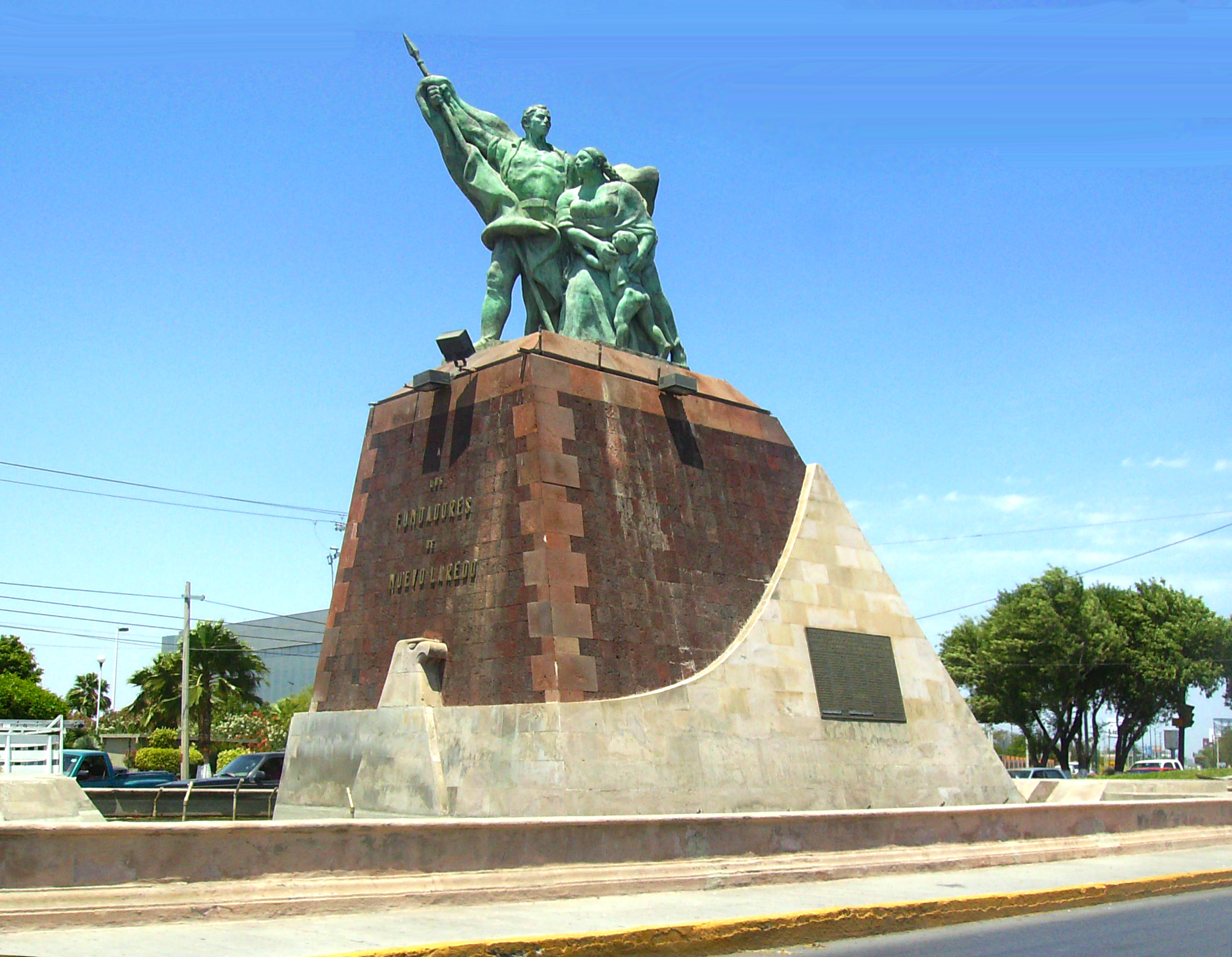 Founder's Monument in Nuevo Laredo